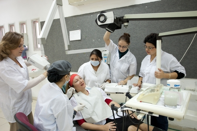 לימודי סייעות ברפואת שיניים